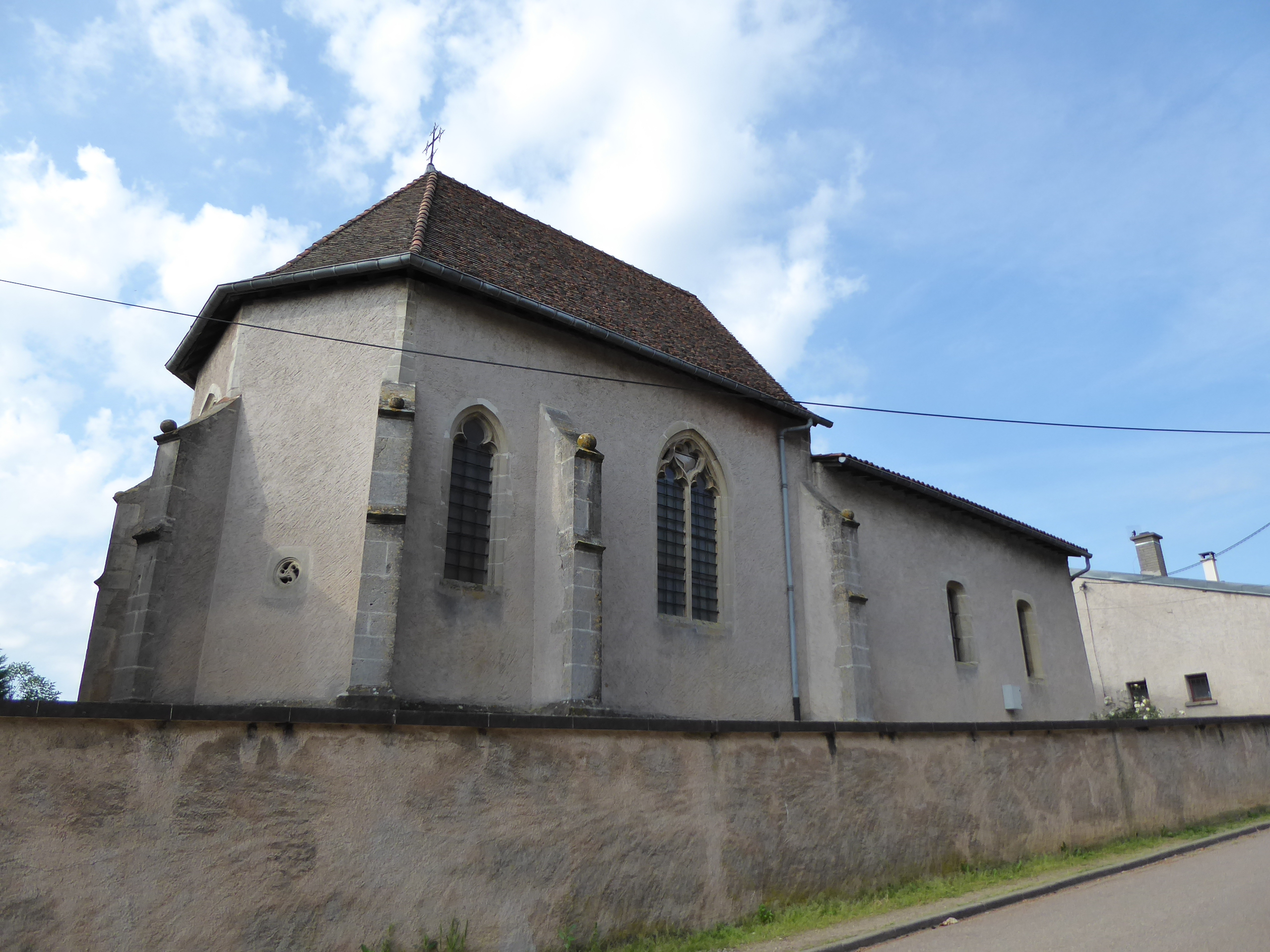 Église Saint-Martin de Dommartin-sous-Amance